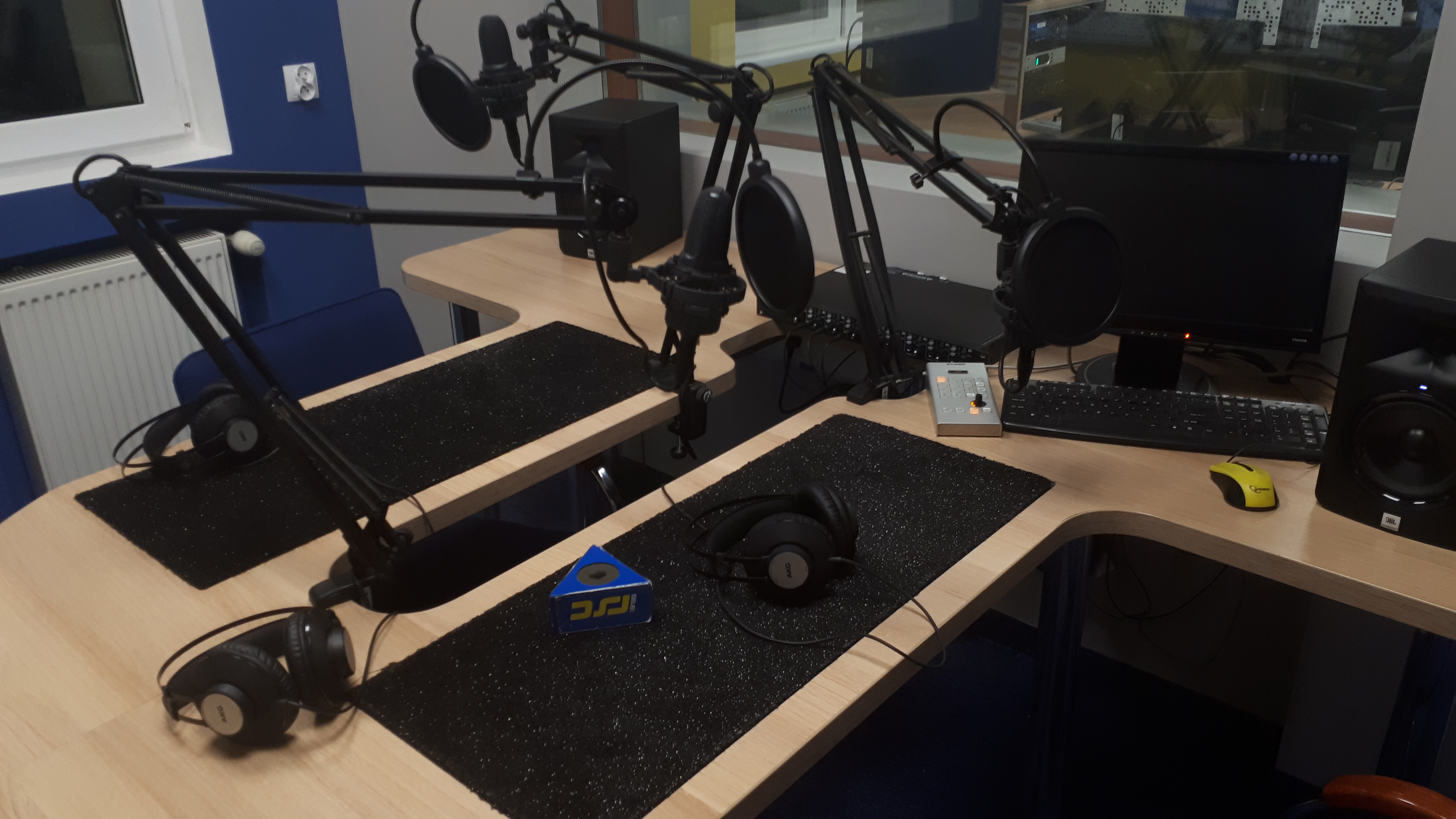 Radio RSC- studio